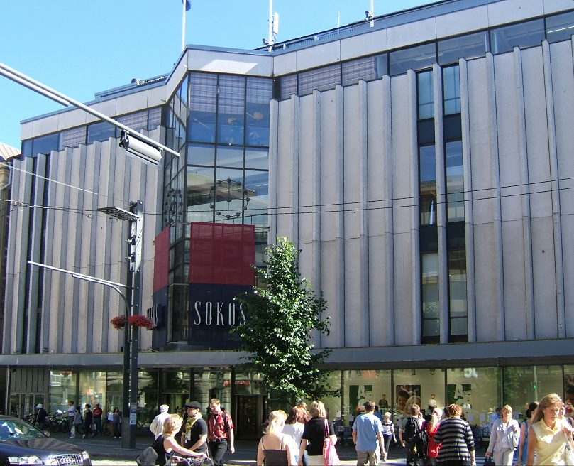 Tampereen Sokos-tavaratalo Hämeenkadun puolelta.